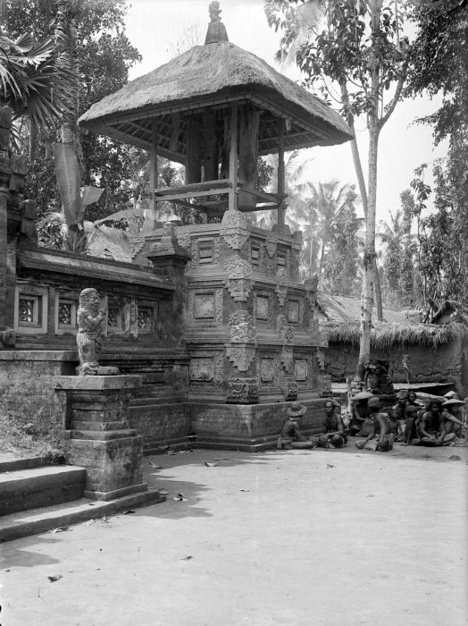 Negatief. Wacht- of klokkentoren met spleettrommen in Blega